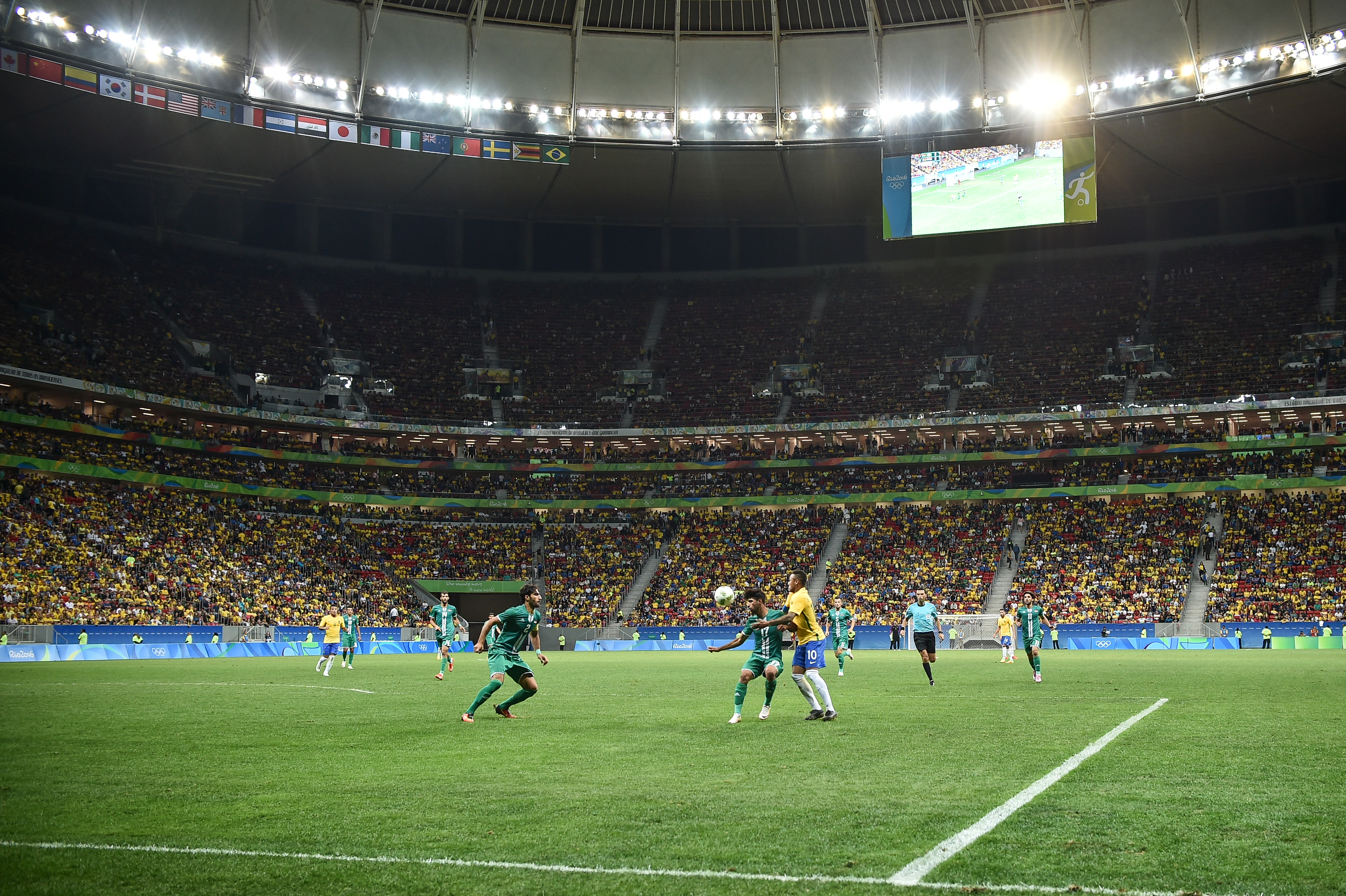 Estádio Nacional de Brasília Mané Garrincha, Brasília, DF, Brasil, 7/8/2016 Foto: Andre Borges/Agência Brasília. Brasil e Iraque jogam neste domingo (7), no Estádio Mané Garrincha, pelo grupo A do futebol masculino nas Olimpíadas 2016.